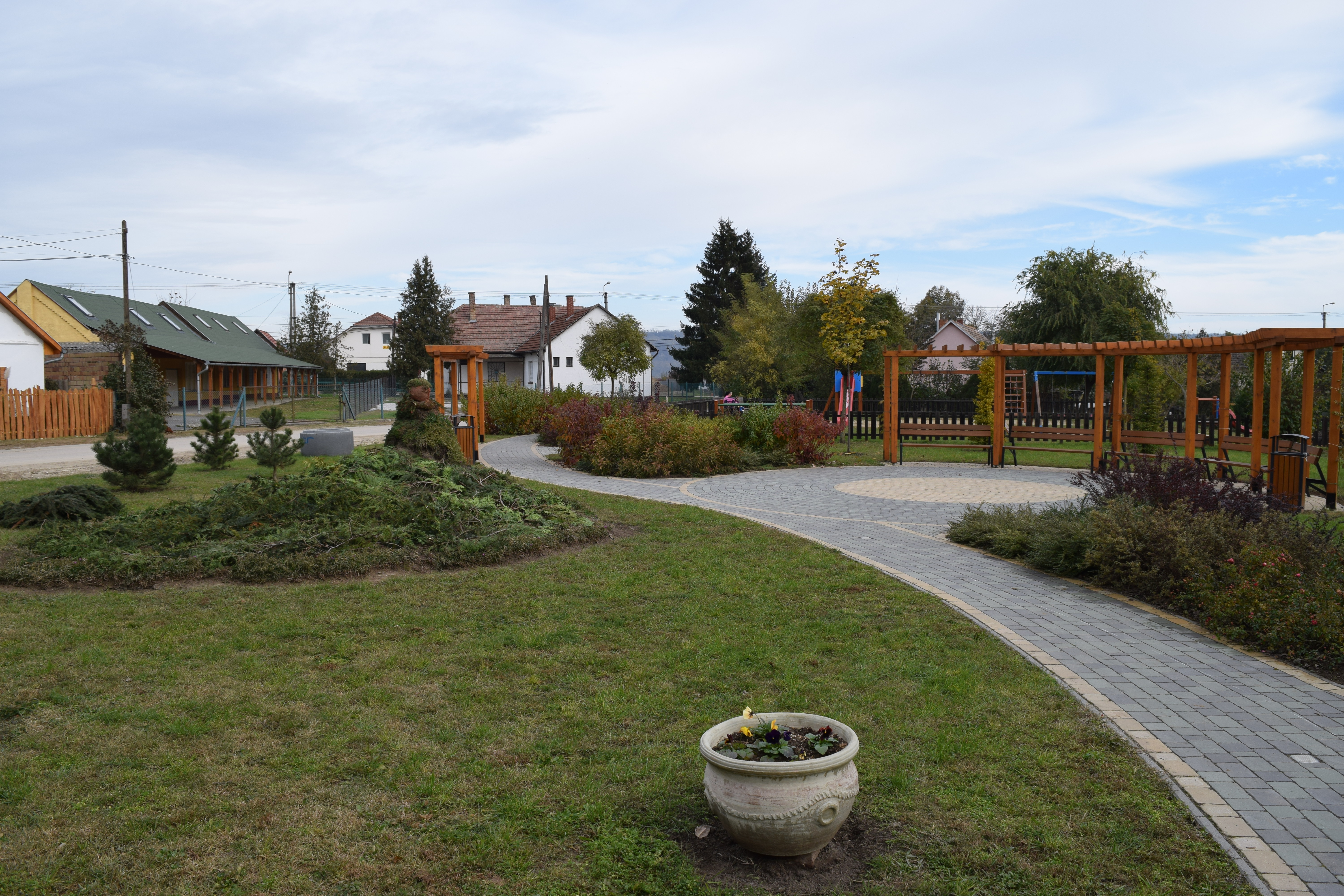 Látrány főtere